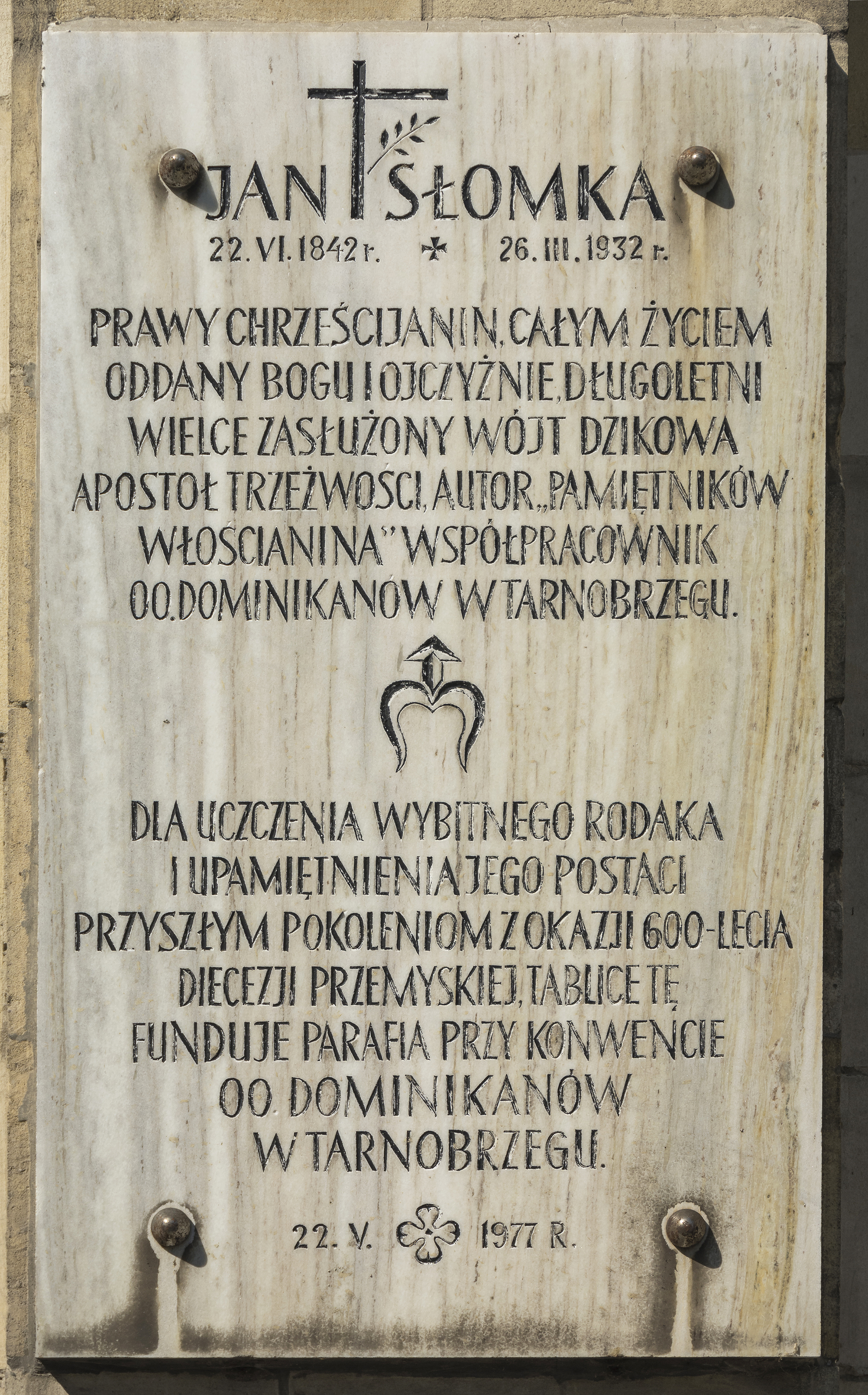 Tarnobrzeg, kościół p.w. Wniebowzięcia NMP, 1693-1707, 1904-1909